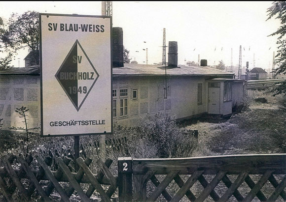 1.Geschäftsstelle Blau-Weiss Buchholz. Eingeweiht 30.10.1971